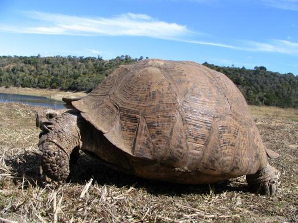 Pantherschildkröte im Habitat (östliche Kapregion, Südafrika)